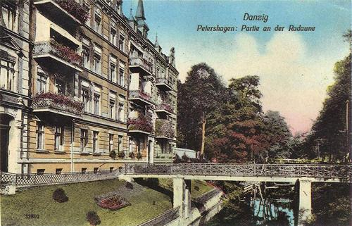 Gdańsk Zaroślak, nad Kanałem Raduni, około 1900 r.